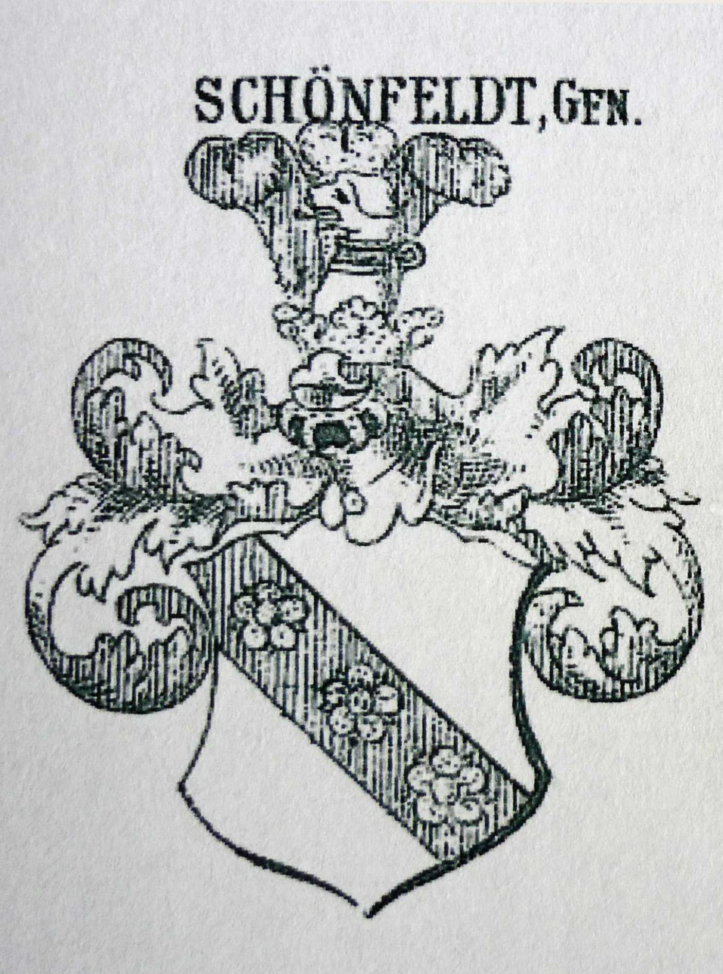 Wappen der böhmischen Grafen von Schönfeld (Reichsgrafenwürde 1788)